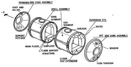 Schnittdiagramm durch ein Spacelab-Doppelmodul